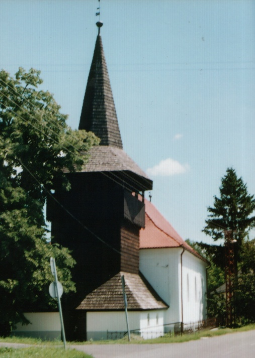 Uszka református temploma a fa haranglábbal 2008 augusztusában